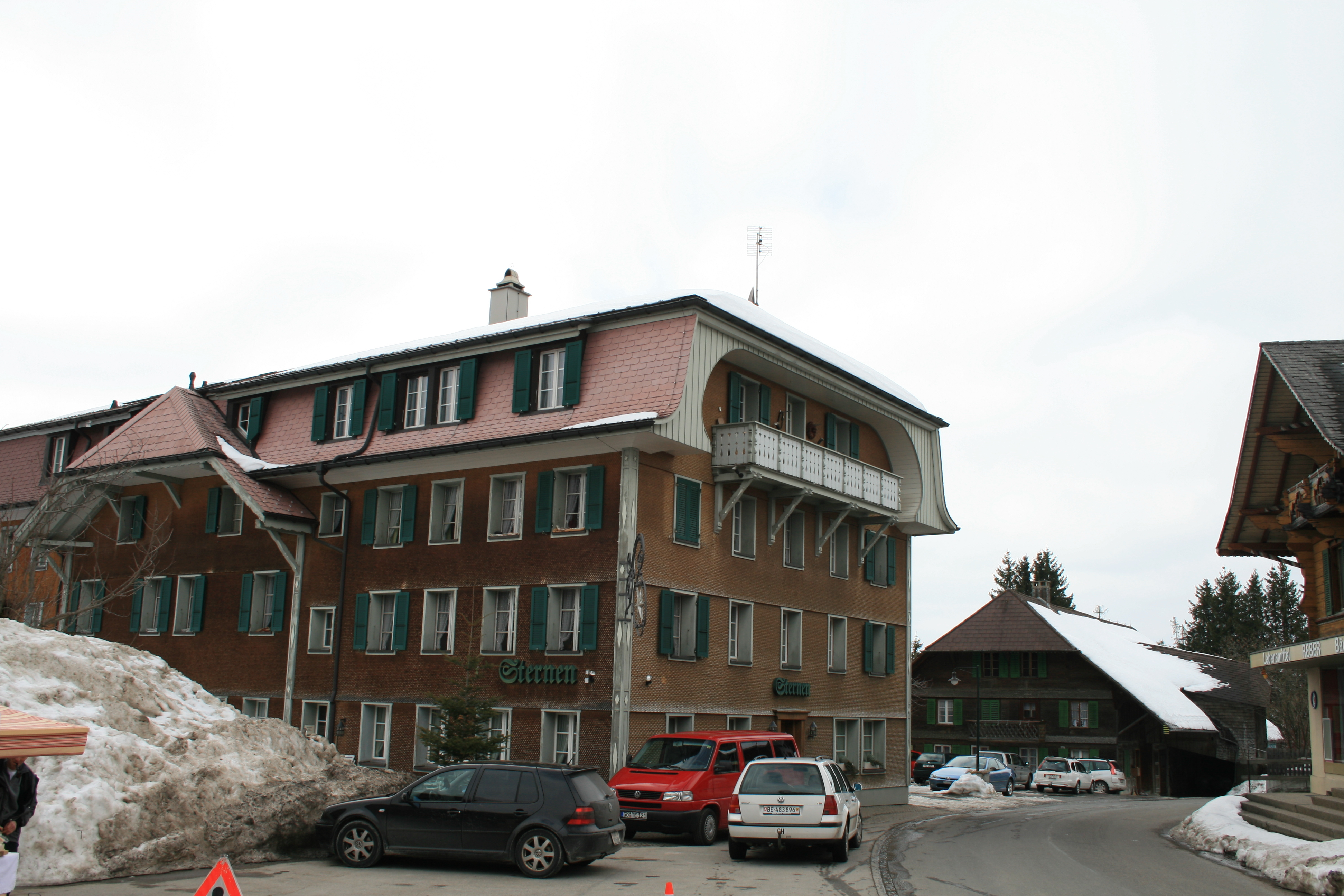 S Reschtaurant "Stärne" z Guggischbärg, Schwiiz